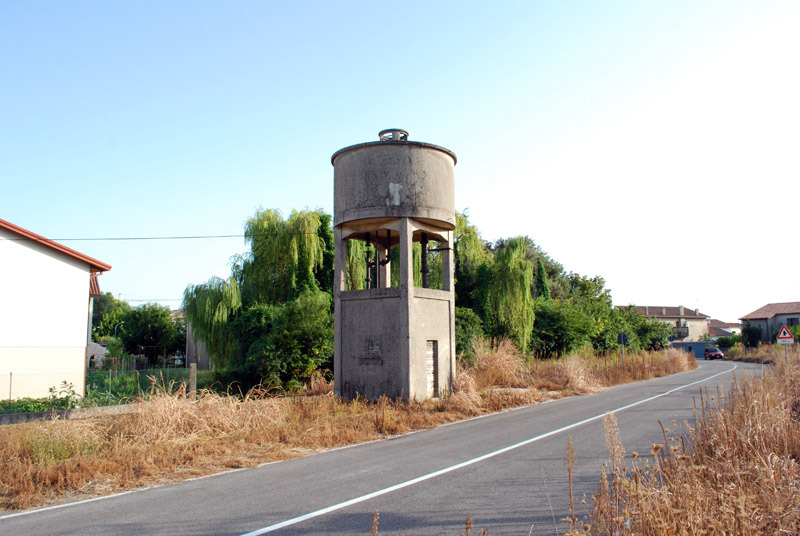 ST Mira Buse